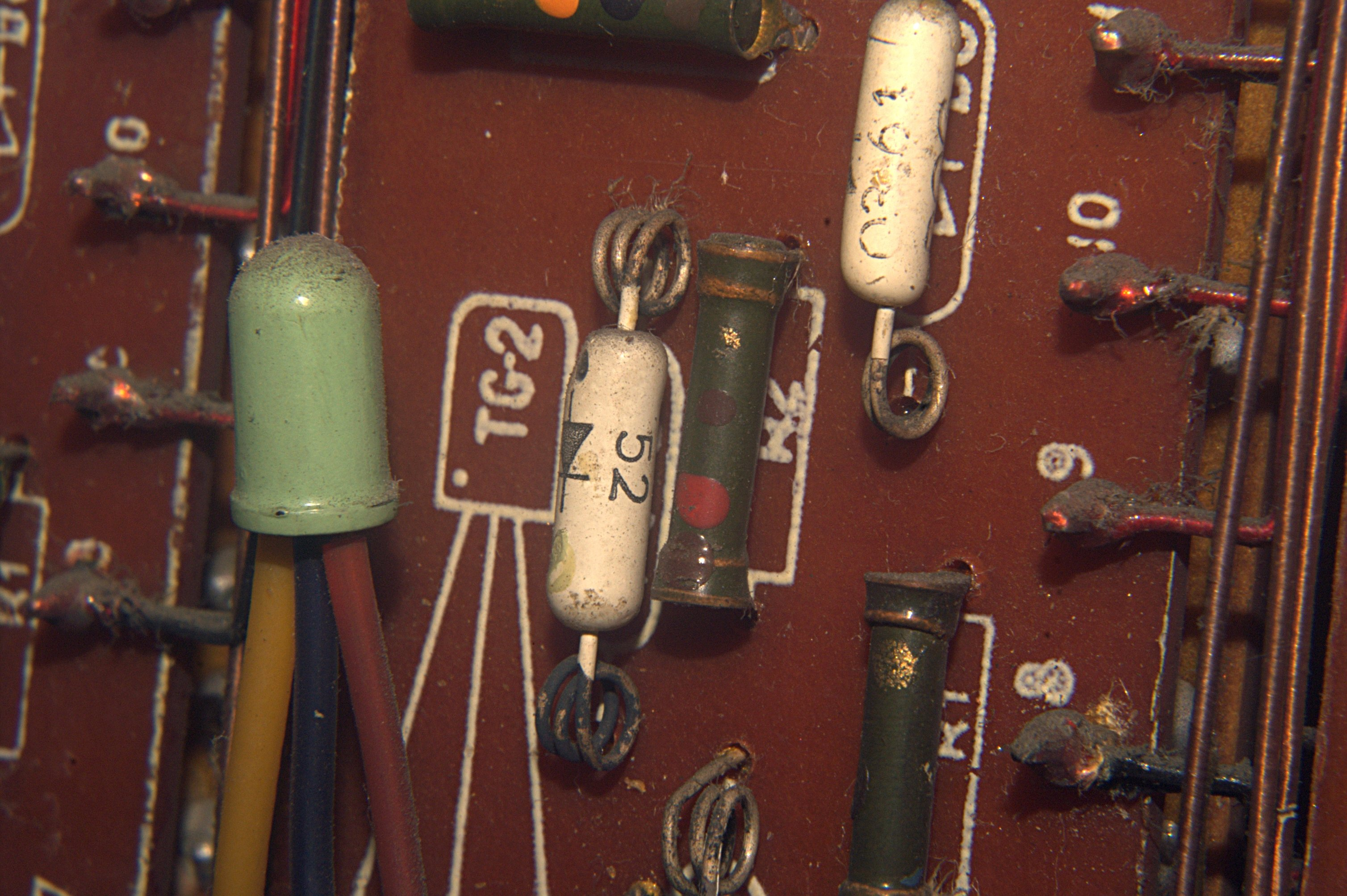 Diody DOG-52 i tranzystory produkcji Tewy w komputerze Odra 1002.